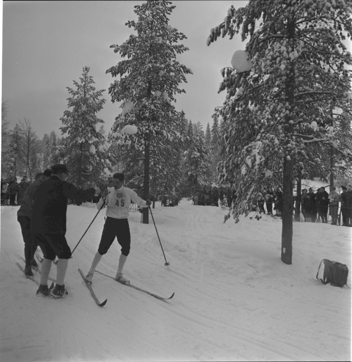 Gjermund Eggen under VM på ski i Oslo 1966. Eggen tok gull på 15 km, 50 km og på stafetten i dette mesterskapet.